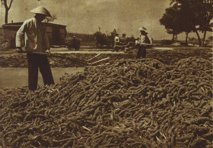 1952年河北昌黎县种植小米